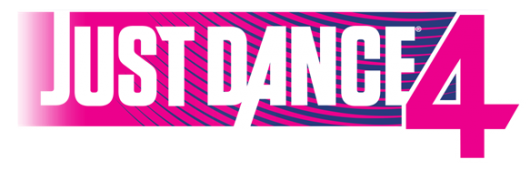 naamloos